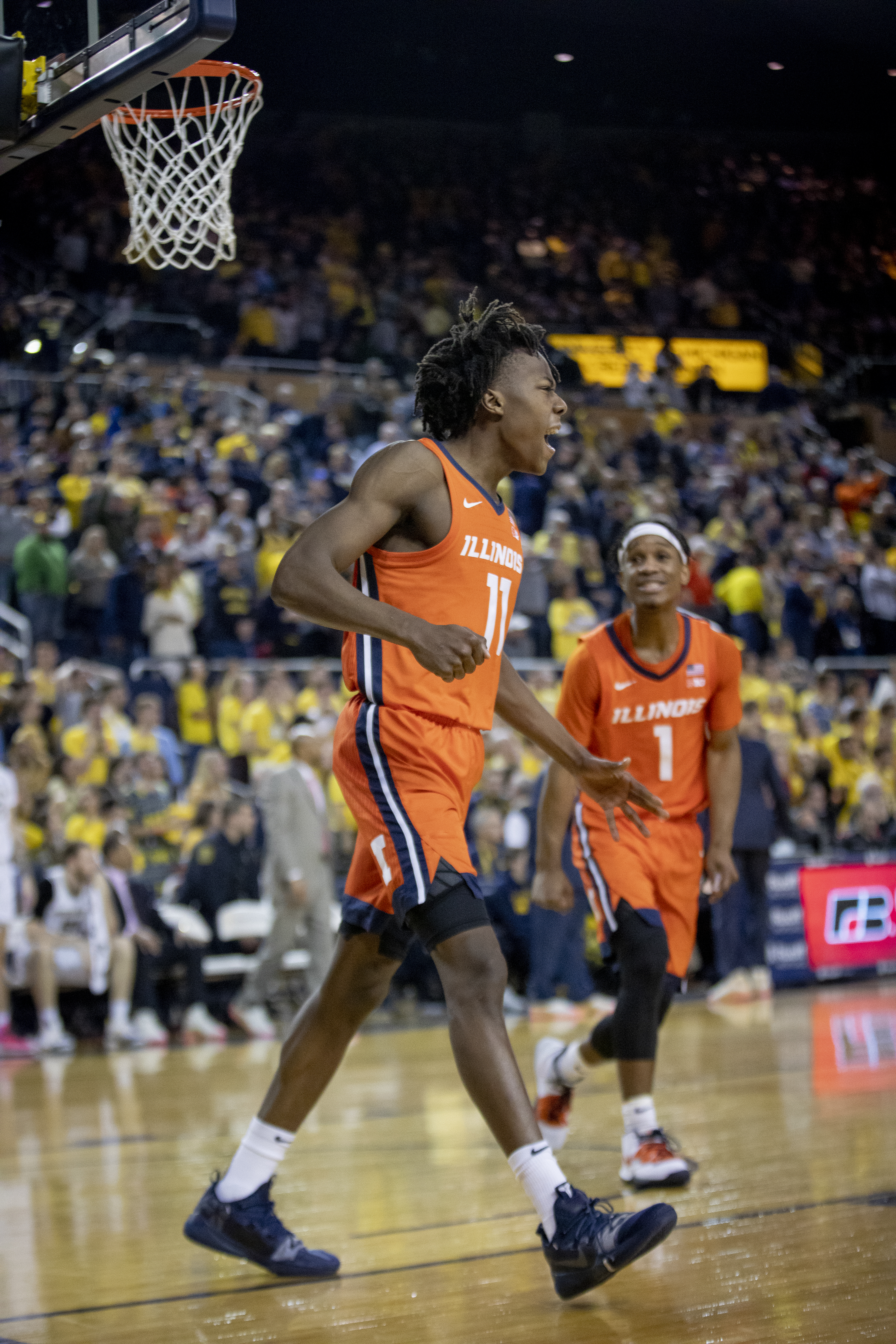 _O6A1775